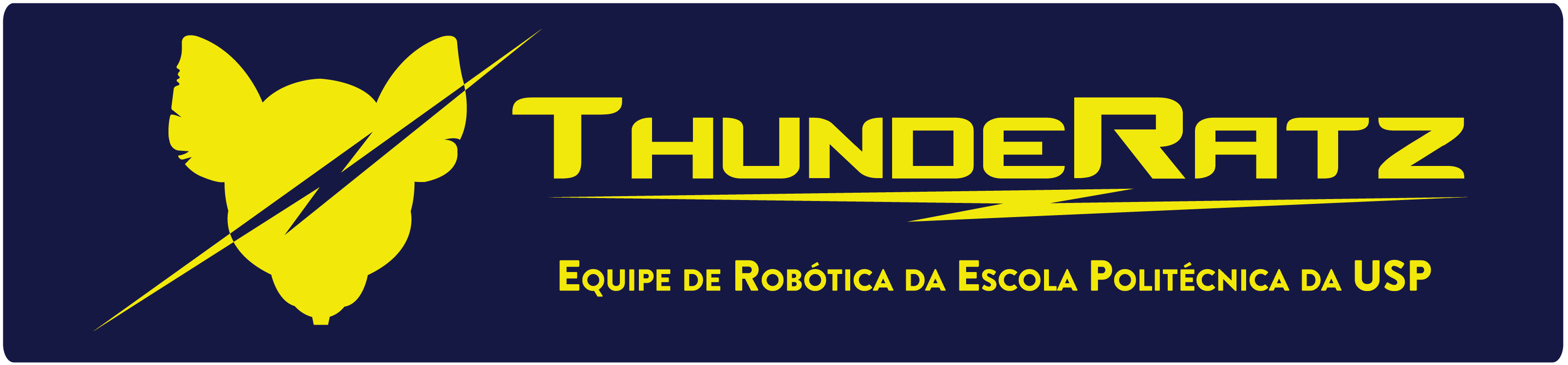 Logo da ThundeRatz - Poli-USP